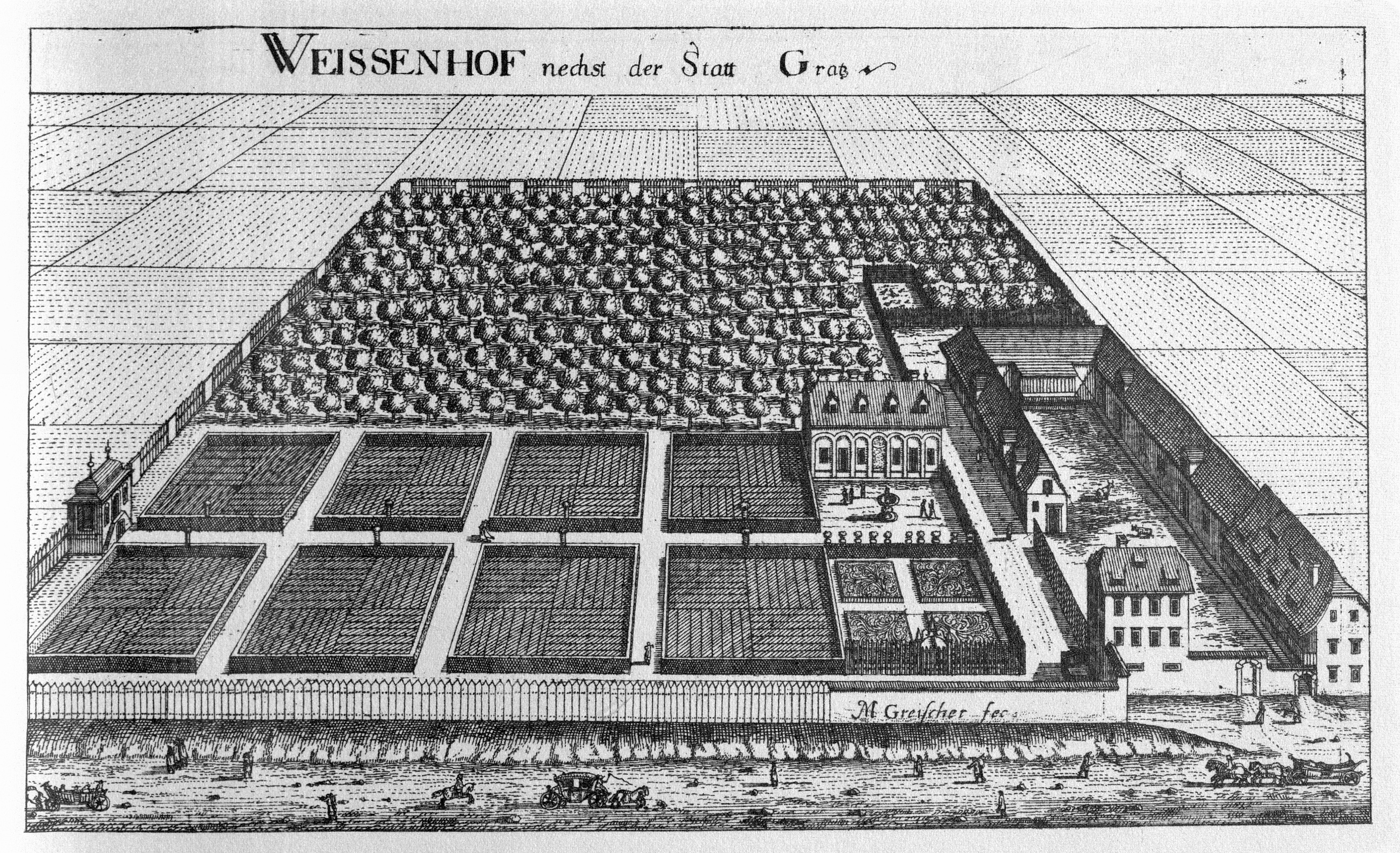 G. M. Vischers Käyserlichen Geographi, Topographia Ducatus Stiriae, Das ist: Eigentliche Delineation / und Abbildung aller Städte / Schlösser / Marcktfleck / Lustgärten / Probsteyen / Stiffter / Clöster und Kirchen / so es sich im Herzogthumb Steyrmarck befinden; Und anjetzo Umb einen billichen Preyß zu finden seynd Bey Johann Bitsch Universitäts Buchhandlern / Auff dem Juden=Platz bey der guldenen Saulen. Graz 1681 Die Nummerierung der Dateien folgt der alphabetischen Reihung der Ortsnamen